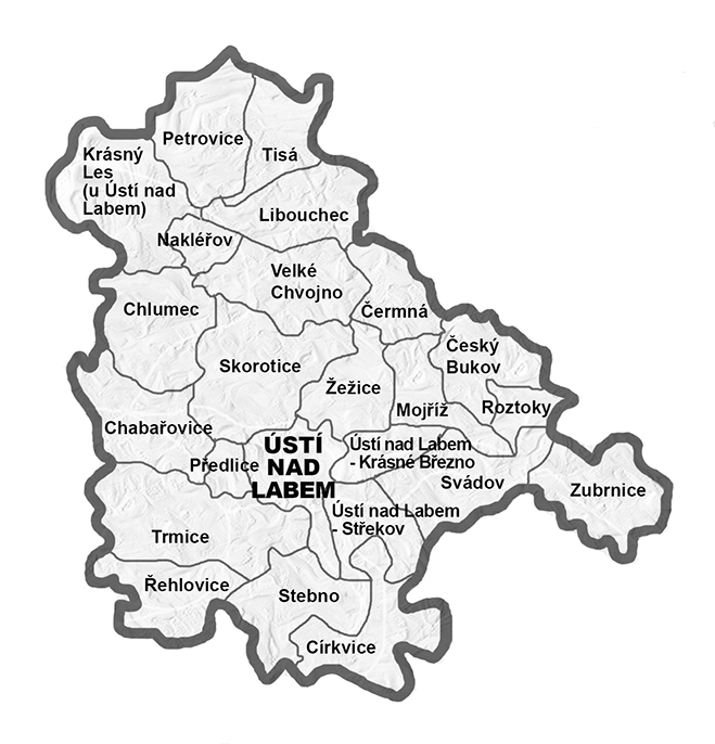 Diecéze litoměřická, ústecký vikariát - farnosti